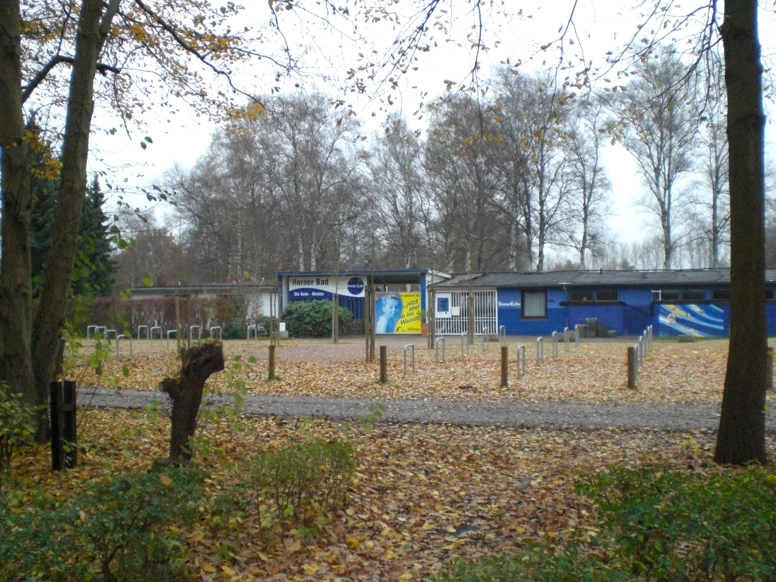 Freibad Horn im Herbst, Bremen